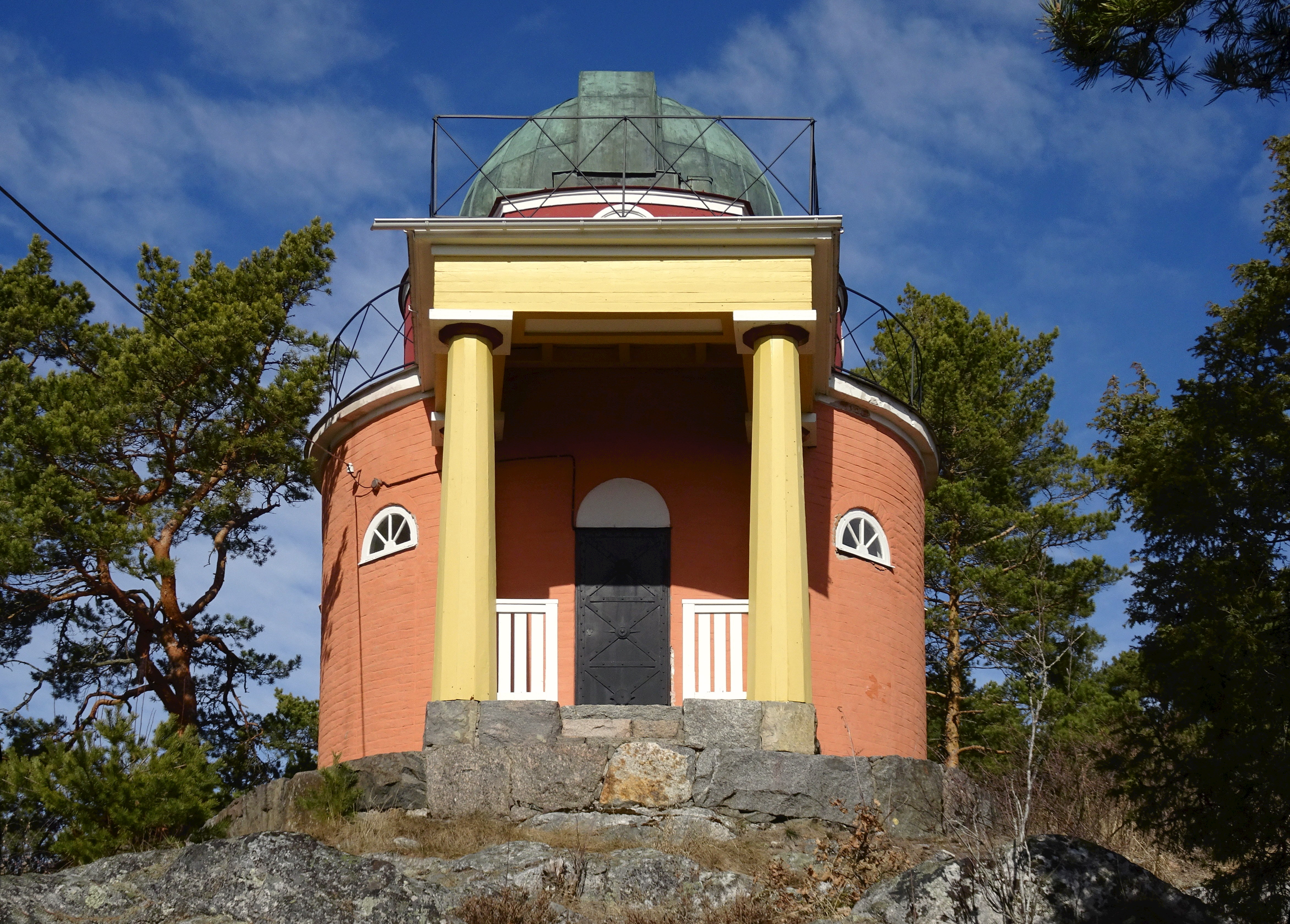 Kvistabergs observatorium,äldsta observatoriet